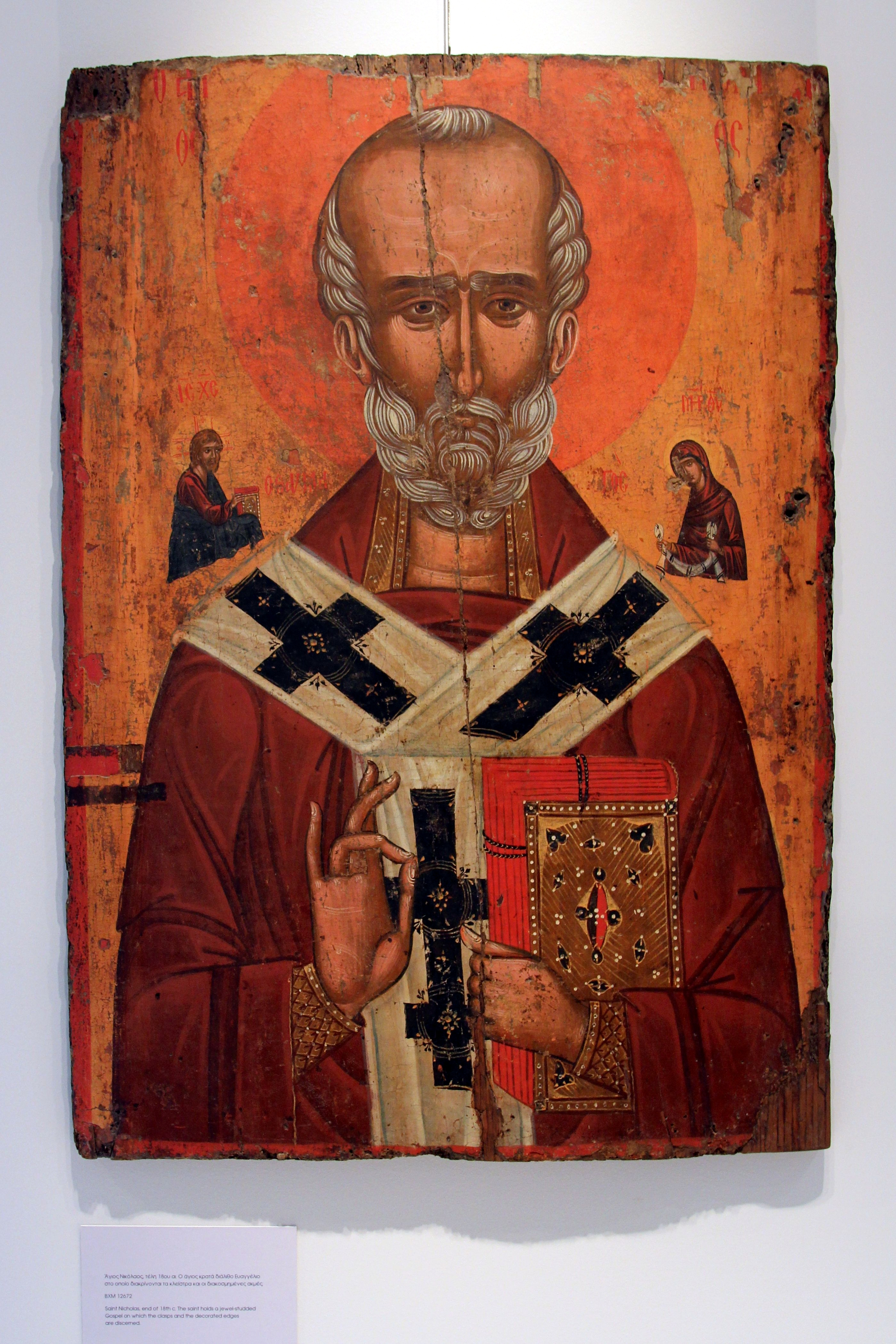 The saint holds a jewel-studded Gospel on which the clasps and the decorated edges are discerned. 'The Art of Bookbinding: From Byzantium to Contemporary Artistic Creation' (Sept. 2012 - Feb. 2013). Temporary exhibition. Byzantine and Christian Museum, Athens, Greece. --- Άγιος Νικόλαος, τέλη 18ου αι. Ο άγιος κρατά διάλιθο Ευαγγέλιο στο οποίο διακρίνονται τα κλείστρα και οι διακοσμημένες ακμές. BXM 12672. "Η Τέχνη της Βιβλιοδεσίας. Από το Βυζάντιο στη Σύγχρονη Εικαστική Δημιουργία" Σεπ 2012 - Φεβ. 2013. Περιοδική έκθεση. Βυζαντινό και Χριστιανικό Μουσείο, Αθήνα.